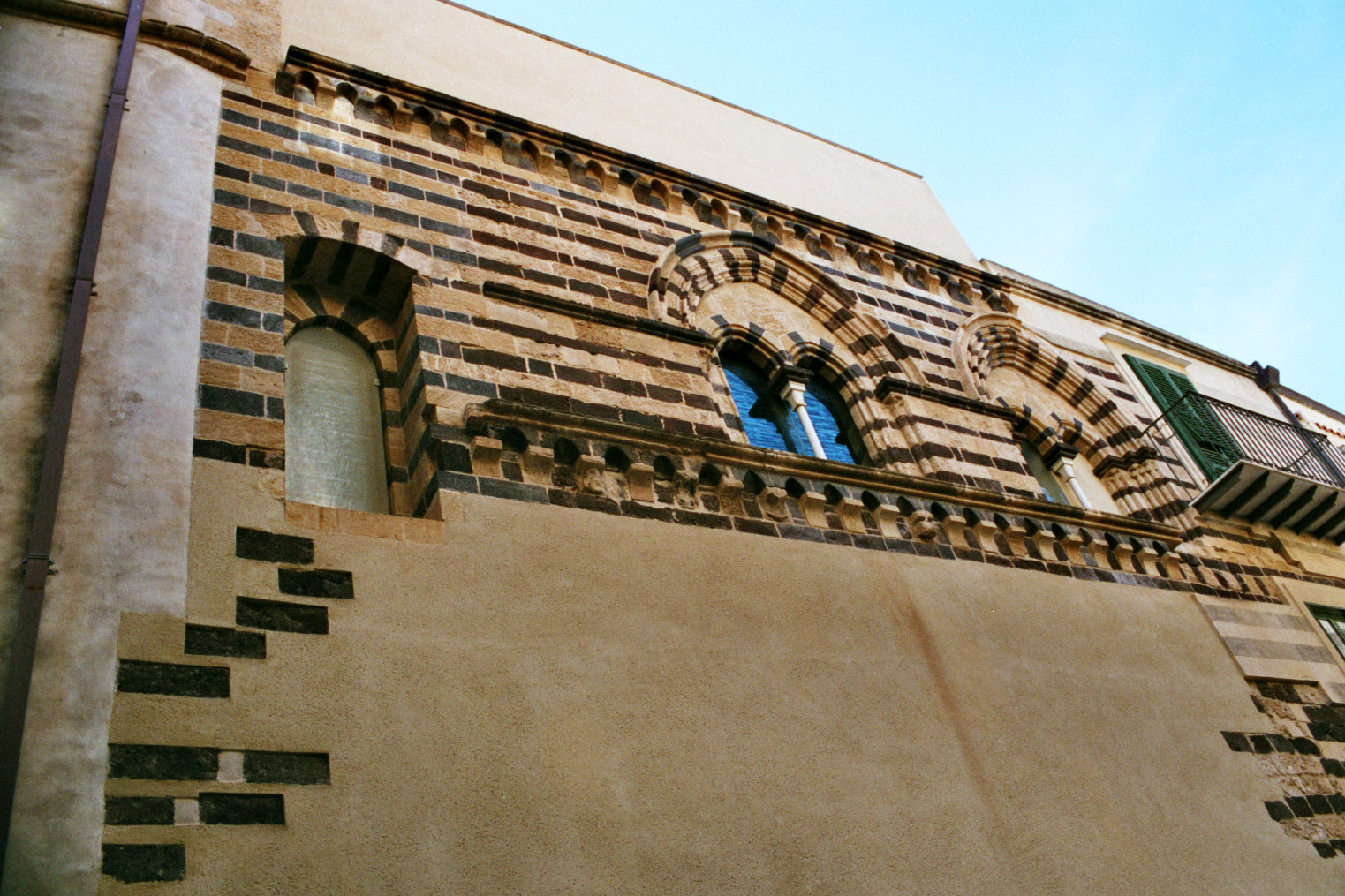 Cefalù, Italy Osterio Magno, lateral facade